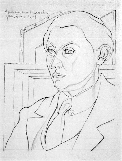 Juan Gris: Porträt Daniel-Henry Kahnweiler, 32,5 x 26 cm, Bleistift auf Papier, Musée National d'Art Moderne, Centre Georges Pompidou, Paris